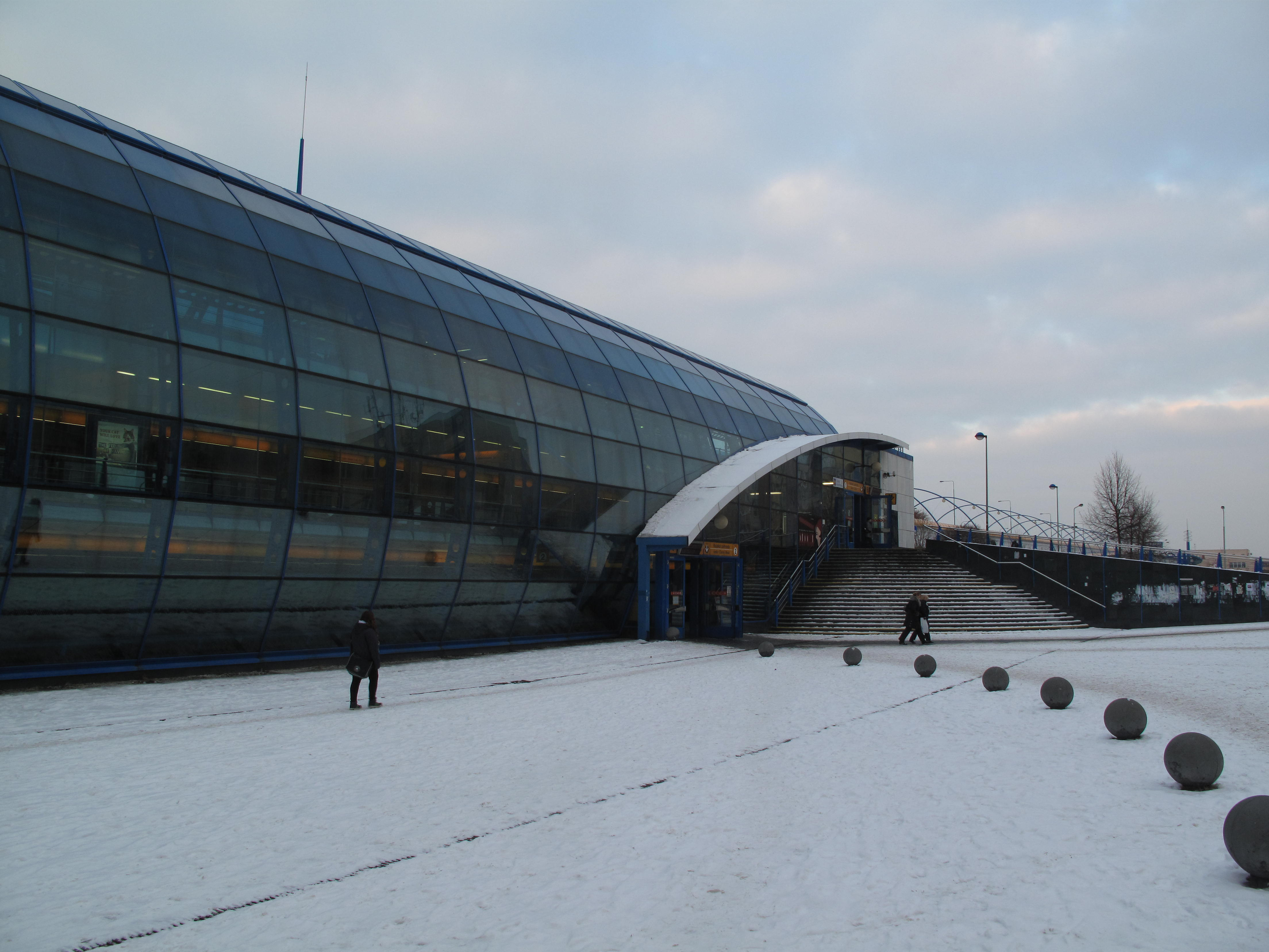 Černý Most